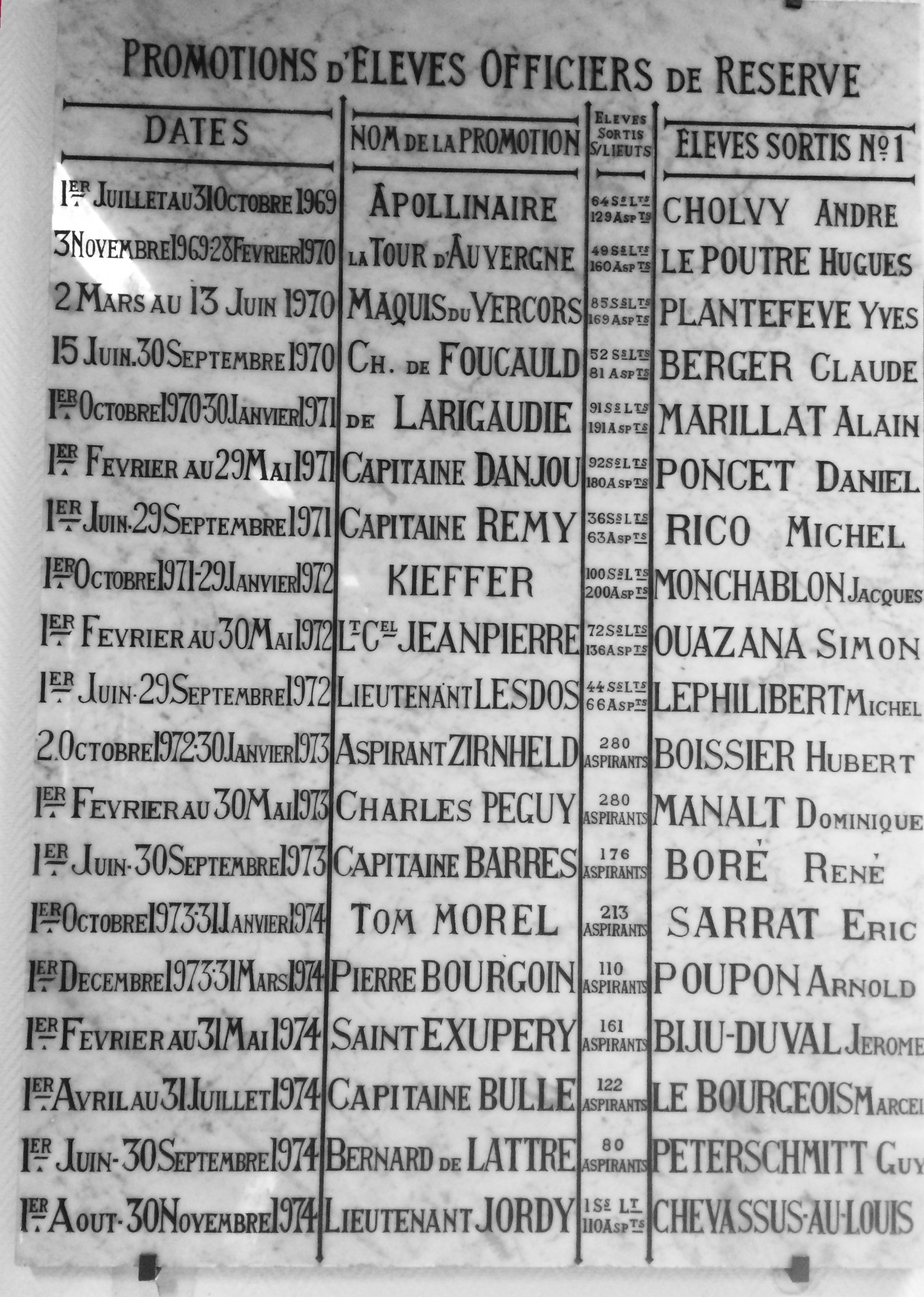 L'un des plaques de marbre apposée au PC du 4e bataillon de l'ESM de Saint-Cyr Coëtquidan, énonçant les promotions d'EOR successives. Ici de 1969 à 1974 inclus. Y sont indiqués, outre les dates du déroulement du stage, le nom du parrain de chaque promotion, le nombre de stagiaires diplômés par promotion, dont celui des sous-lieutenants et des aspirants, ainsi que le nom du major de chaque promotion.